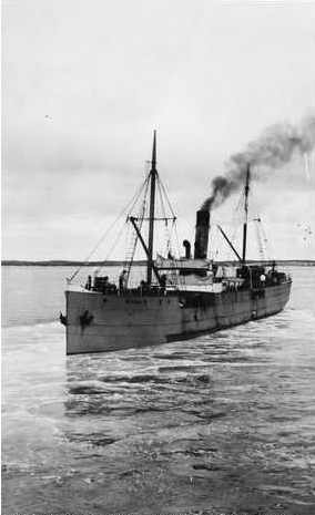 SS Ferrett